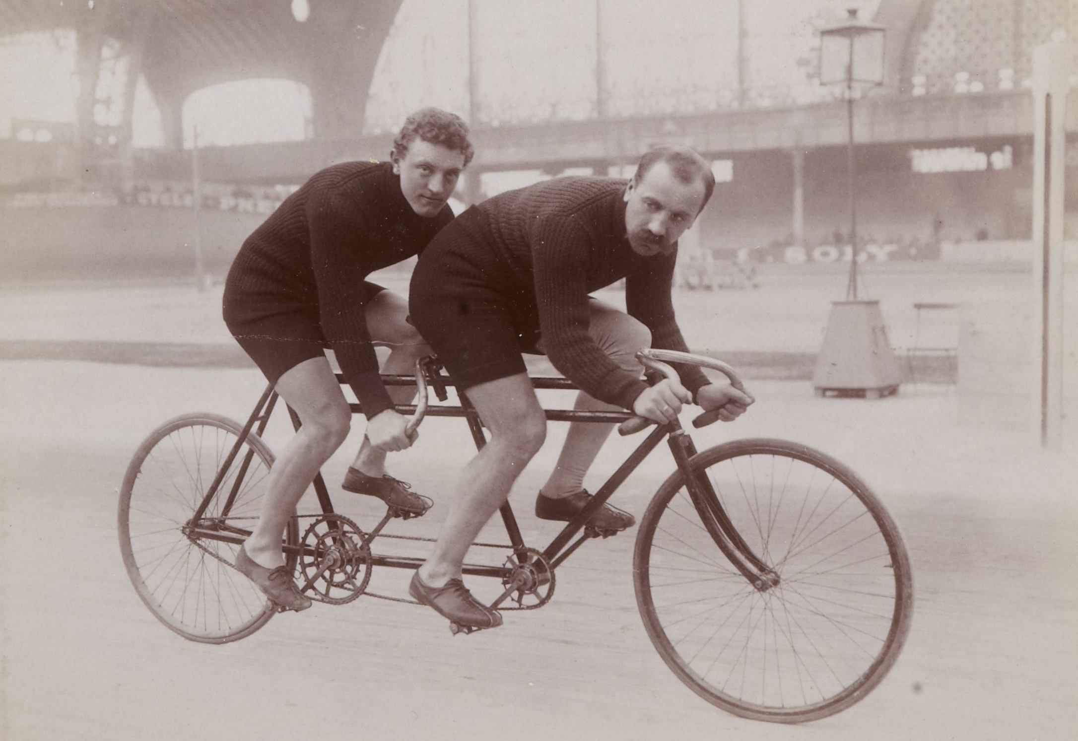 [Collection Jules Beau. Photographie sportive] : T. 24. Années 1903 et 1904 / Jules Beau : F. 47. Vélodrome d hiver, 7 février 1904 ; Mayer, Rutt